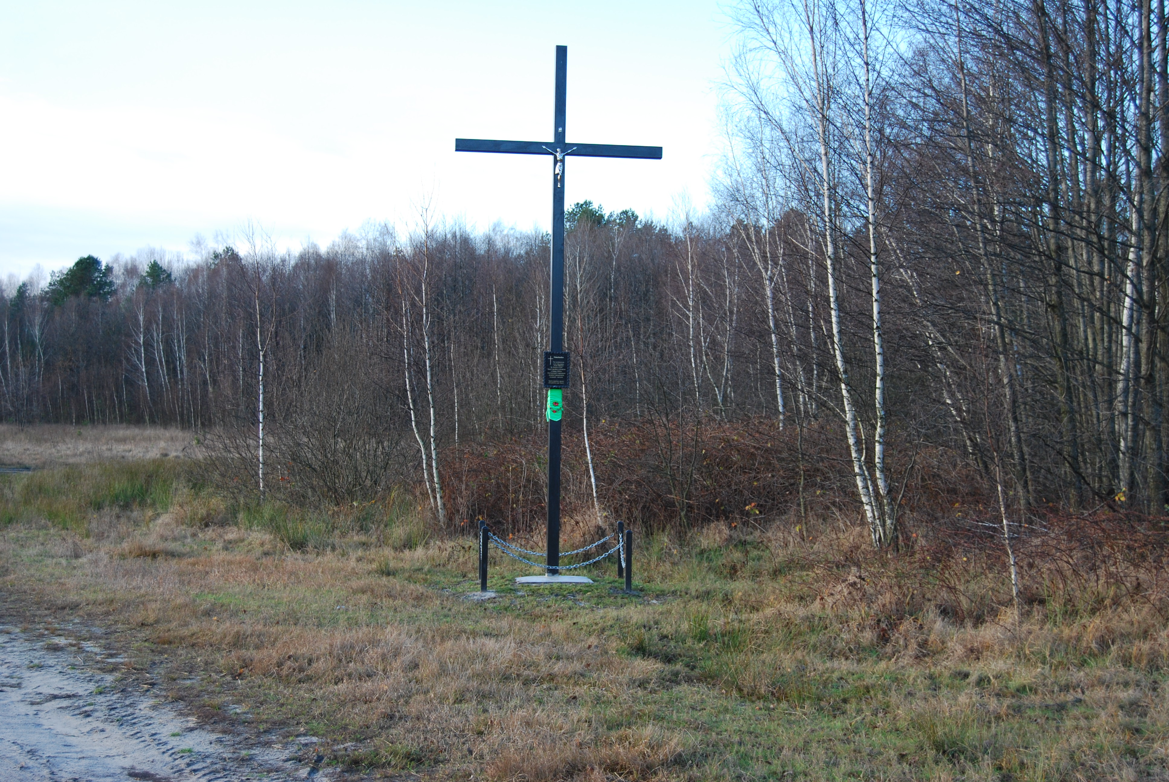 Omelanka. Krzyż pamiątkowy stojący na pograniczu przedwojennych gmin Stepań i Stydyń. Koło krzyża znajdowało się gospodarstwo Antoniego Sawickiego.